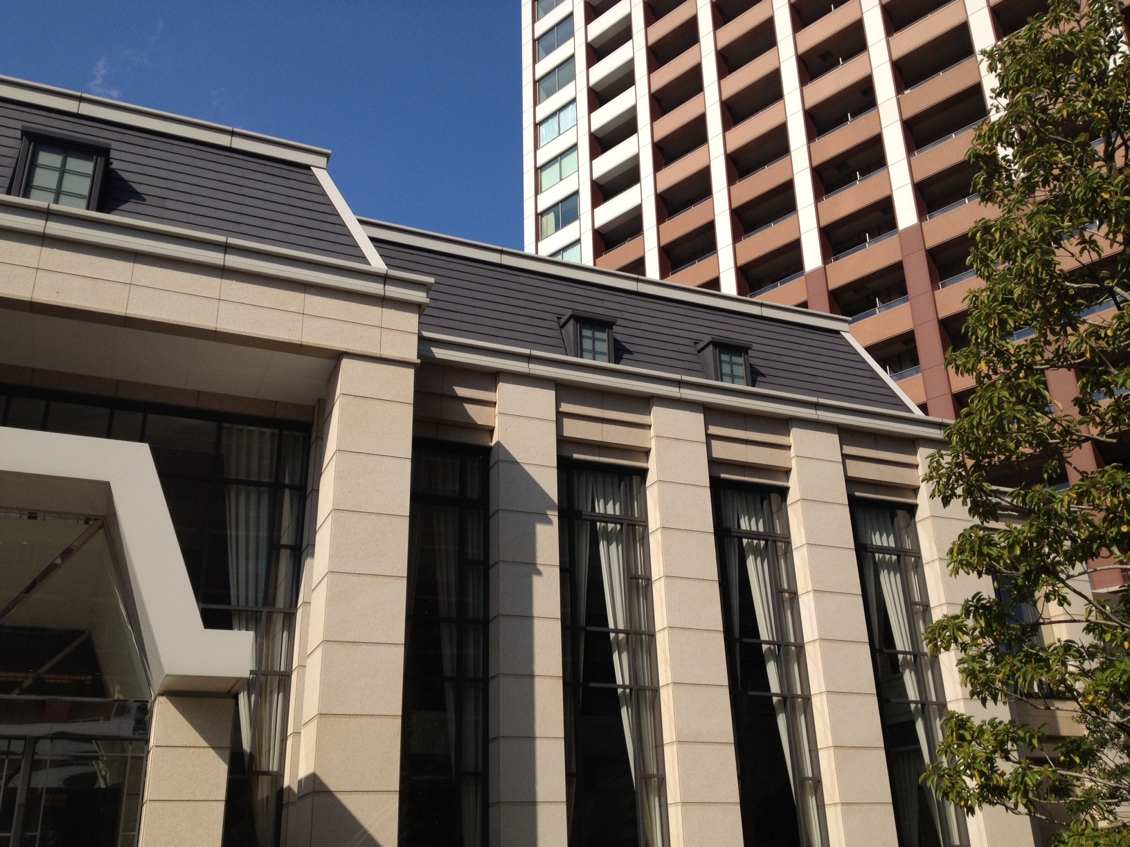 エアタワー・クラブハウス（手前：エントランス棟）とレジデンスタワー（奥）